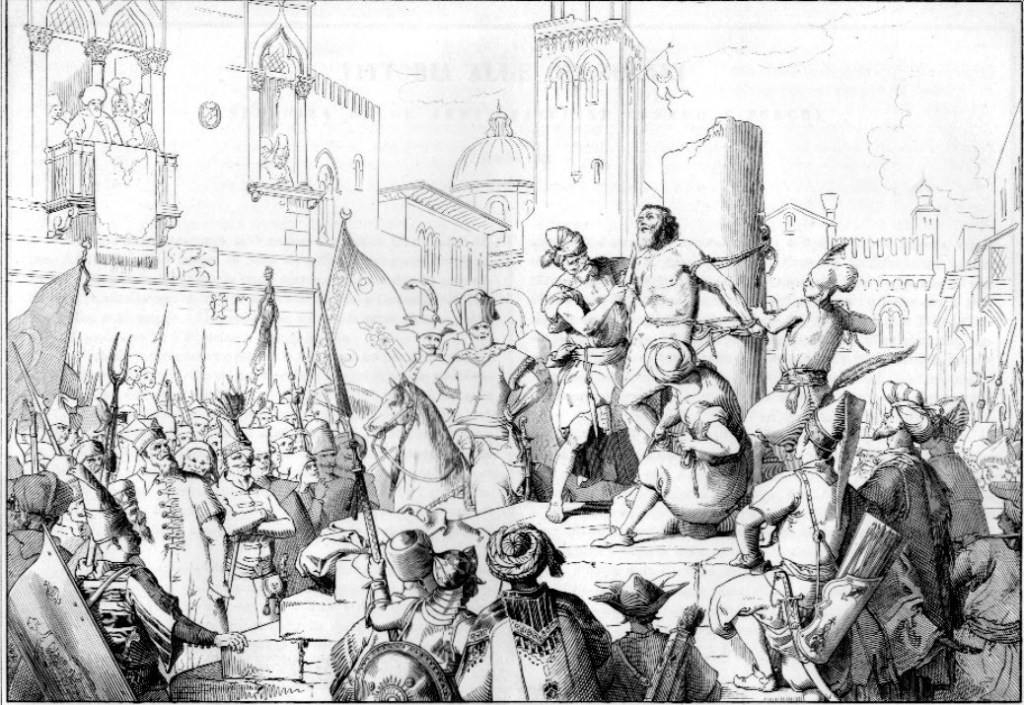 La città cipriota dopo quasi un anno di assedio cede infine alle armi turche. E’ la strage, tanto più violenta e crudele contro chi aveva osato tanto. Marcantonio Bragadin, capitano della Piazza, viene scuoiato vivo … LA SCHEDA STORICA 105 STORIA VENETA ESPRESSA IN 150 TAVOLE INVENTATE E DISEGNATE SULLA SCORTA DELLE CRONACHE E DELLE STORIE E SECONDO I VARI COSTUMI DEL TEMPO INCISE DA ANTONIO VIVIANI E DAI MIGLIORI ARTISTI VENEZIANI ED ILLUSTRATA DA FRANCESCO ZANOTTO